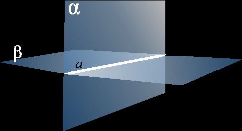 Interlingua: Le linea recte a es le intersection de duo planos, α e β